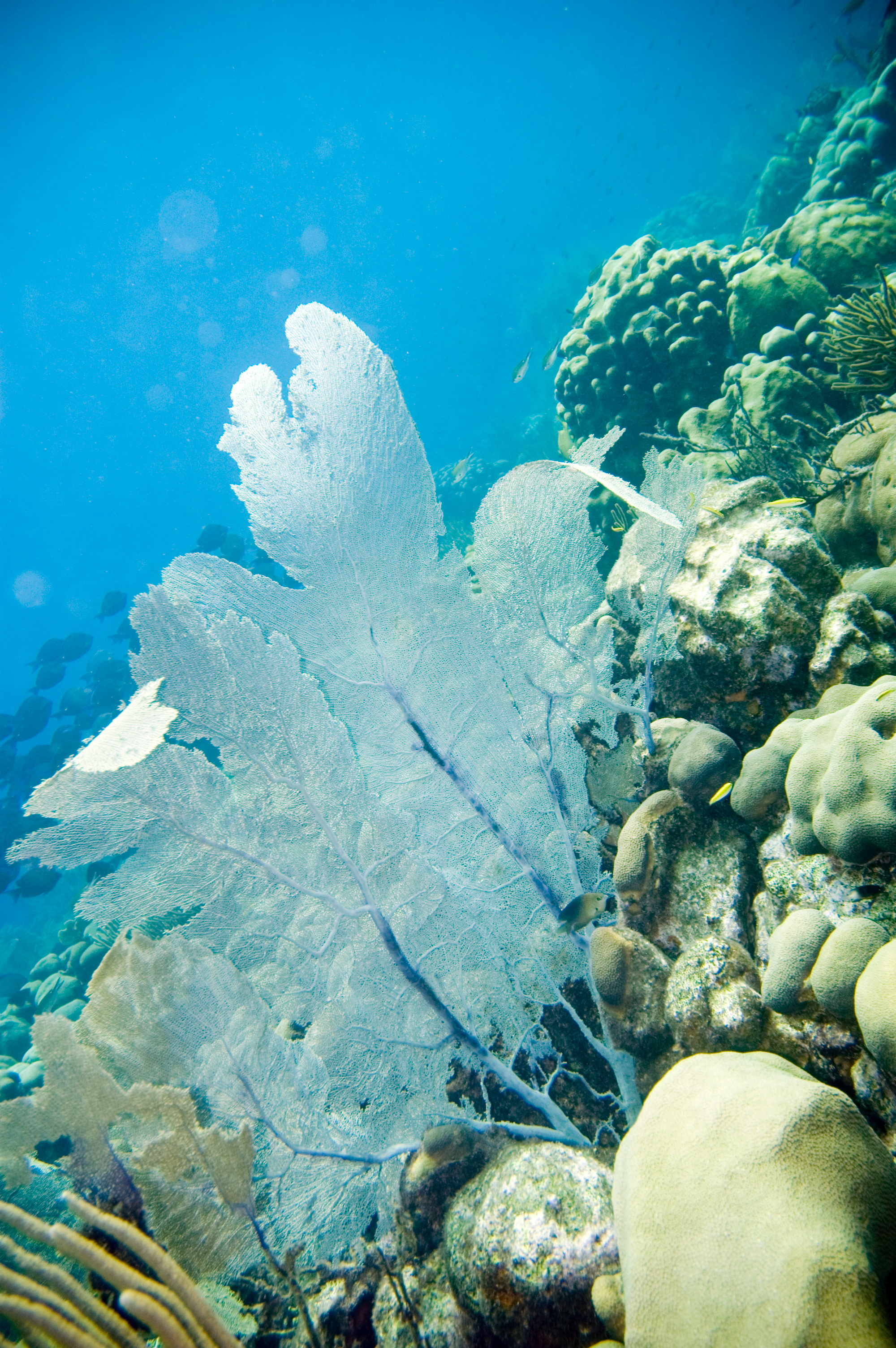 common sea fan Gorgonia ventalina